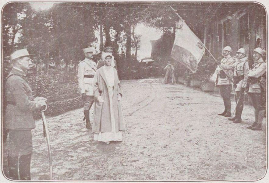 1918 H. M. de Koningin van België voor het vaandel van het 158e regiment infanterie